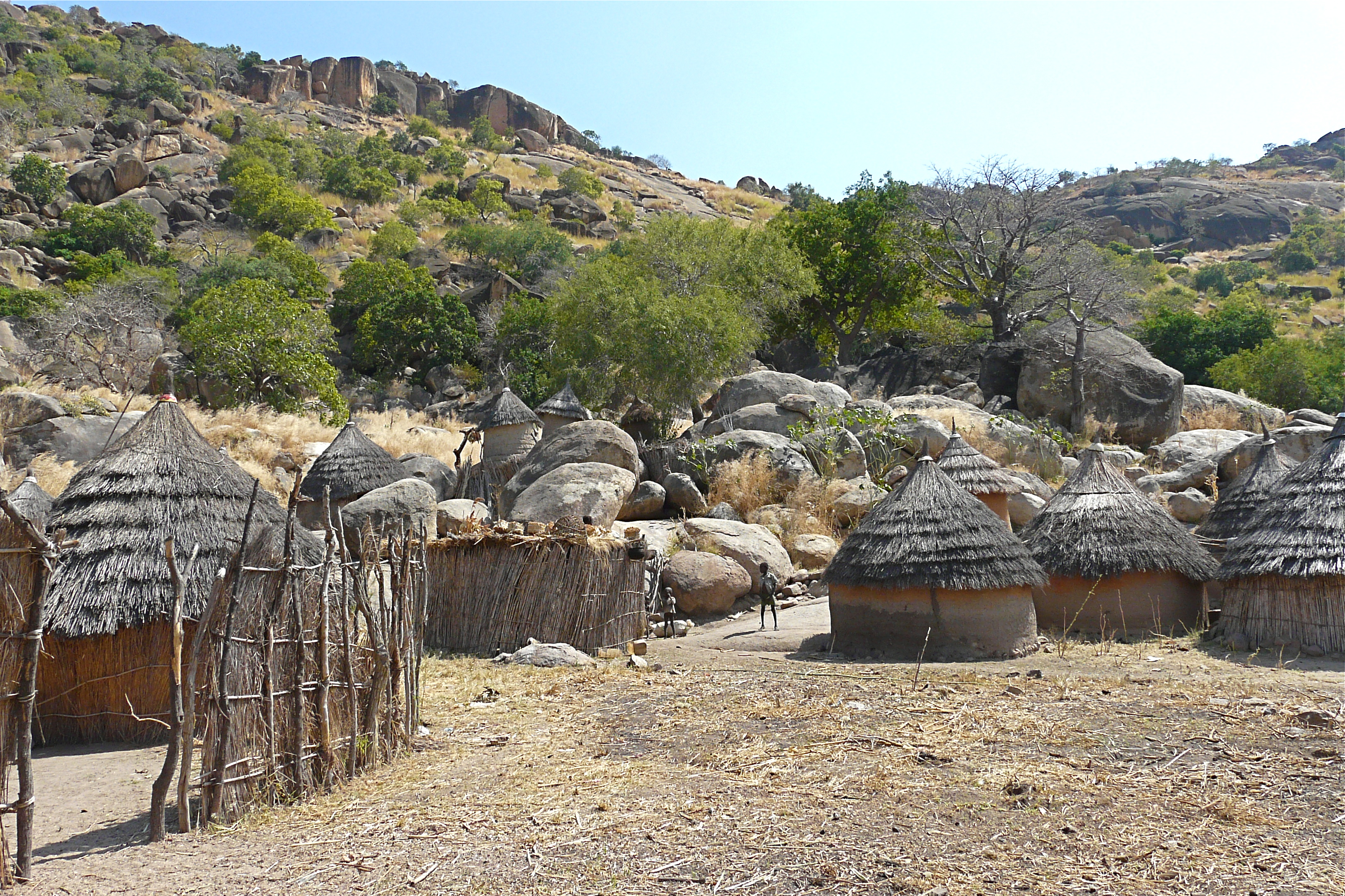 Nuba village near Kau, Nuba Mountains — southern Sudan. Original description: De pittoreske dorpjes hebben hun magie weten te behouden en niets aan charme ingeboet. Aan de voet van de heuvelruggen vinden we tussen grote granieten rotsblokken de typische graanschuurtjes en de ronde lemen hutten.